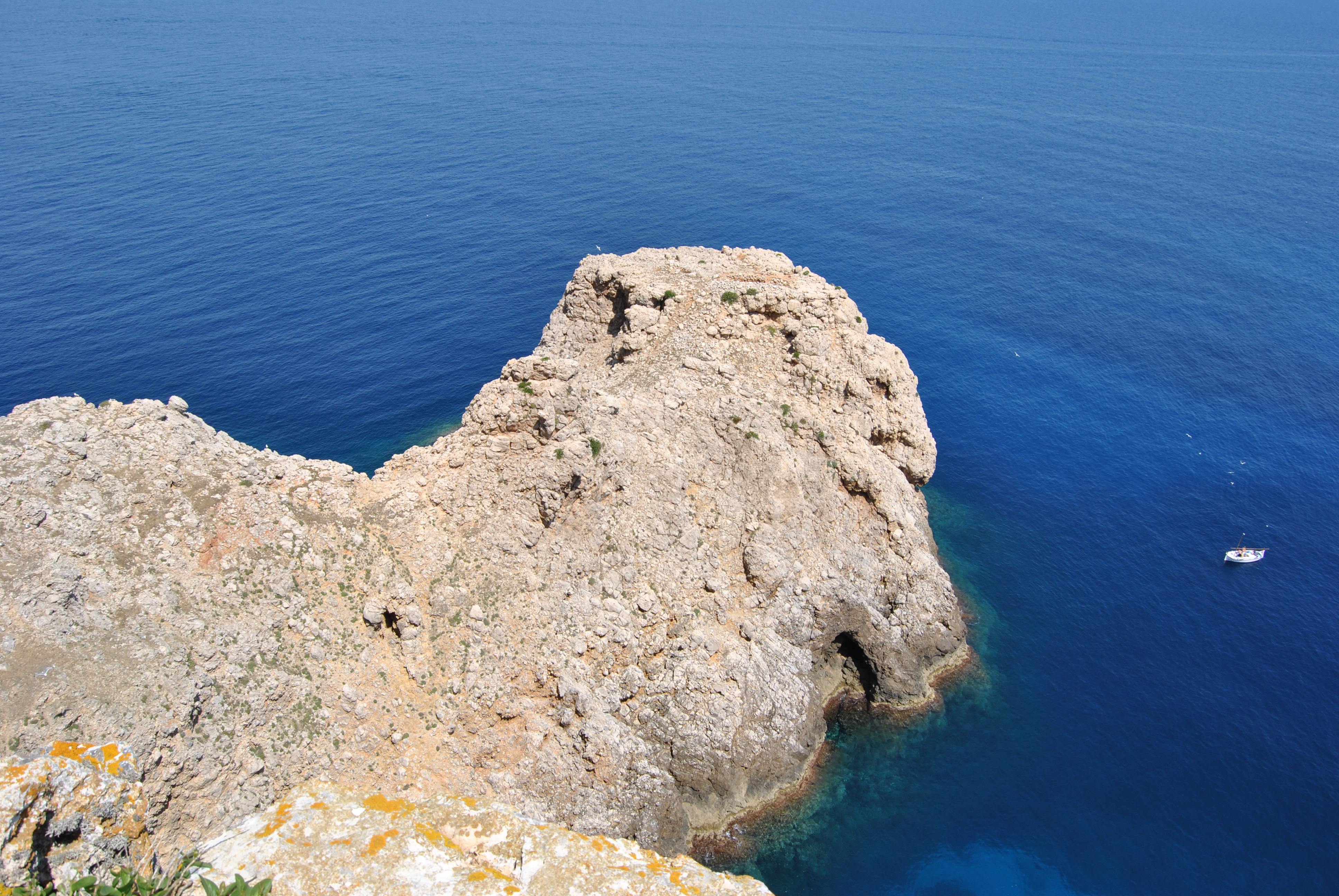 Vista general d'Es Pop Mosquer, on es situa el jaciment arqueològic d'Es Castellet (Ciutadella, Menorca)